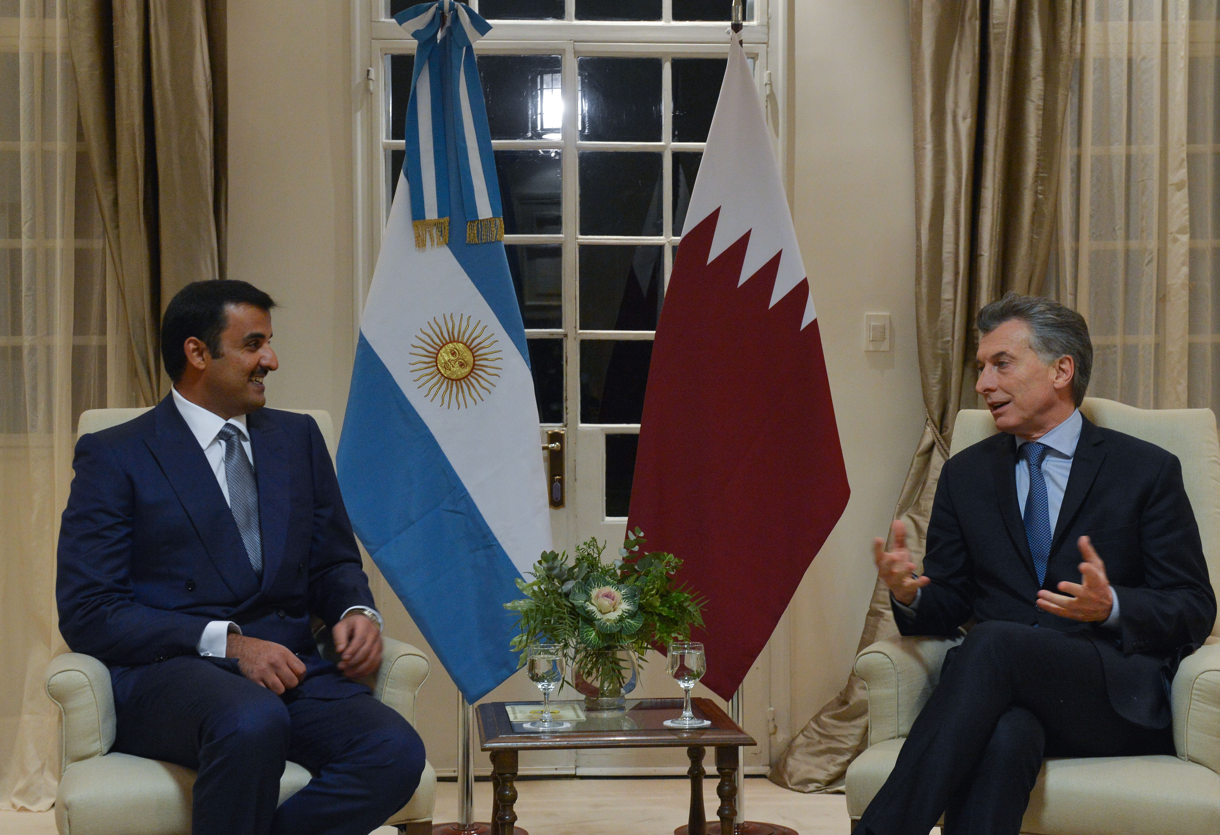 El presidente Mauricio Macri recibió al Emir de Qatar, Sheik Tamim bin Hamad Al Thani, con el objetivo de incrementar la cooperación y el comercio bilateral y fomentar la inversión para áreas clave del país como agroindustria, infraestructura y energía.